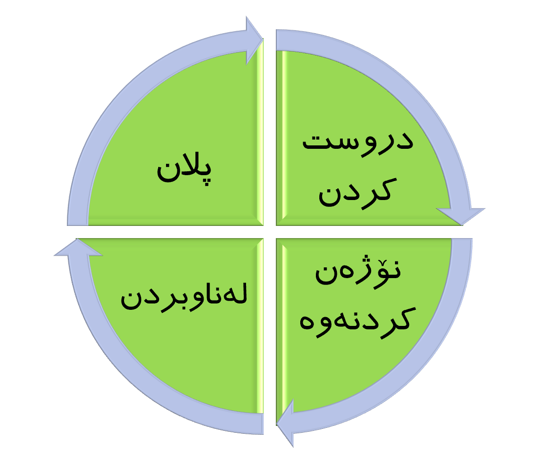 کوردی: بازنەی ژیانی ژێرخان بە کورتی